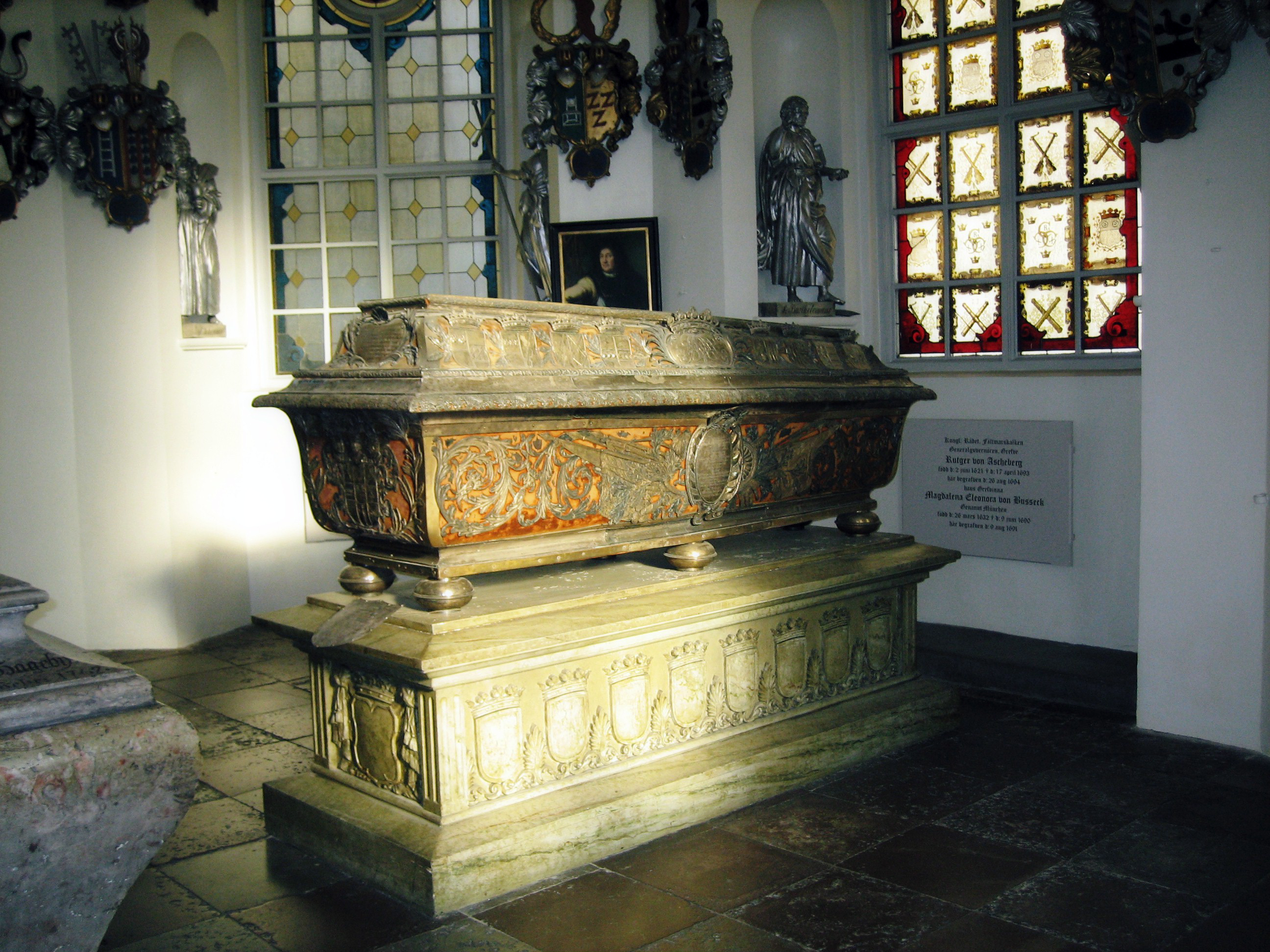 Greve Rutger von Aschebergs kista. Aschebergska gravkoret, Christinae kyrka (Tyska kyrkan), Göteborg.